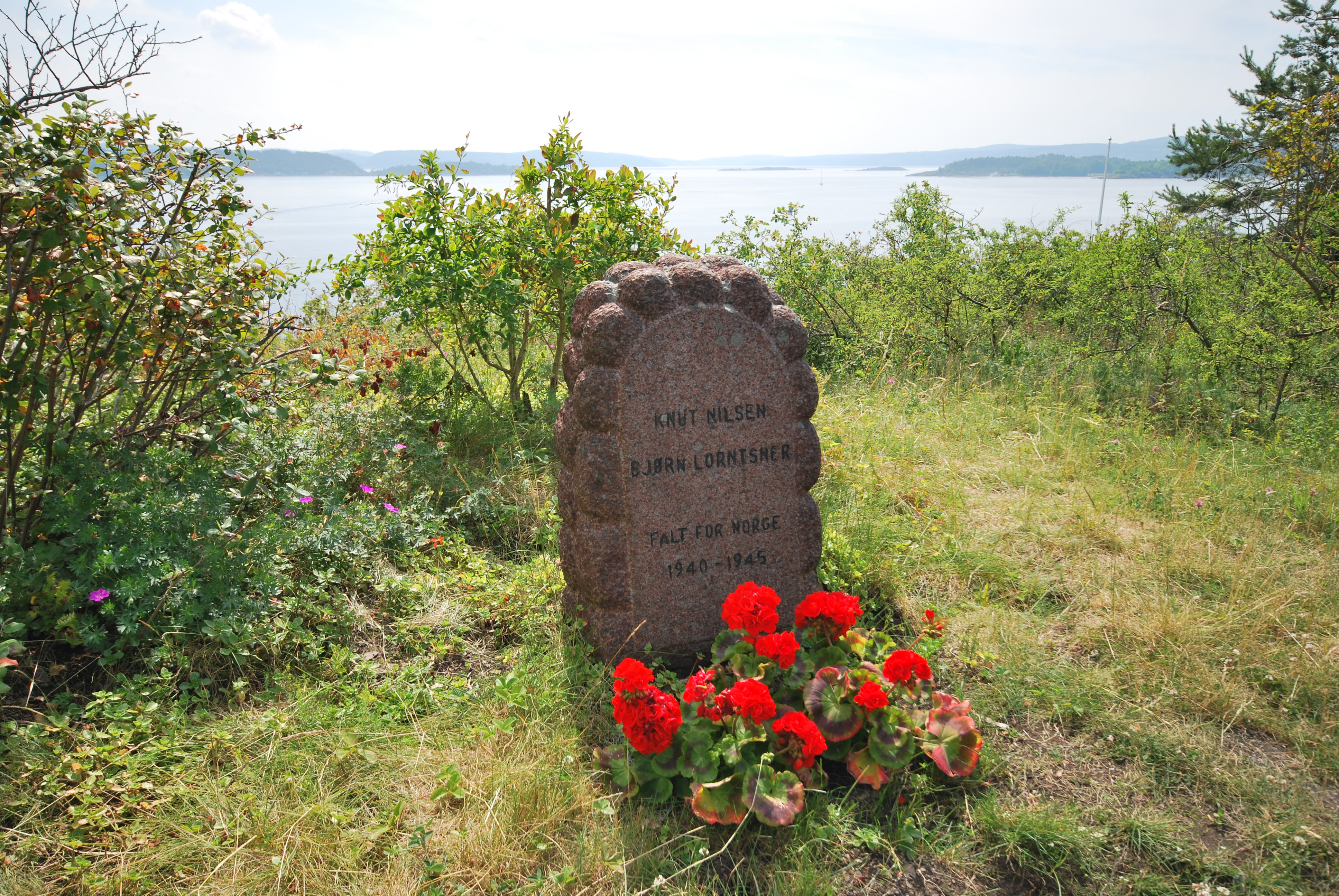 Minnesmerke over falne i annen verdenskrig, Bleikøya, Oslo